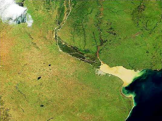 Provincia de Buenos Aires y Río de la Plata Categoría:Argentina (imagen)